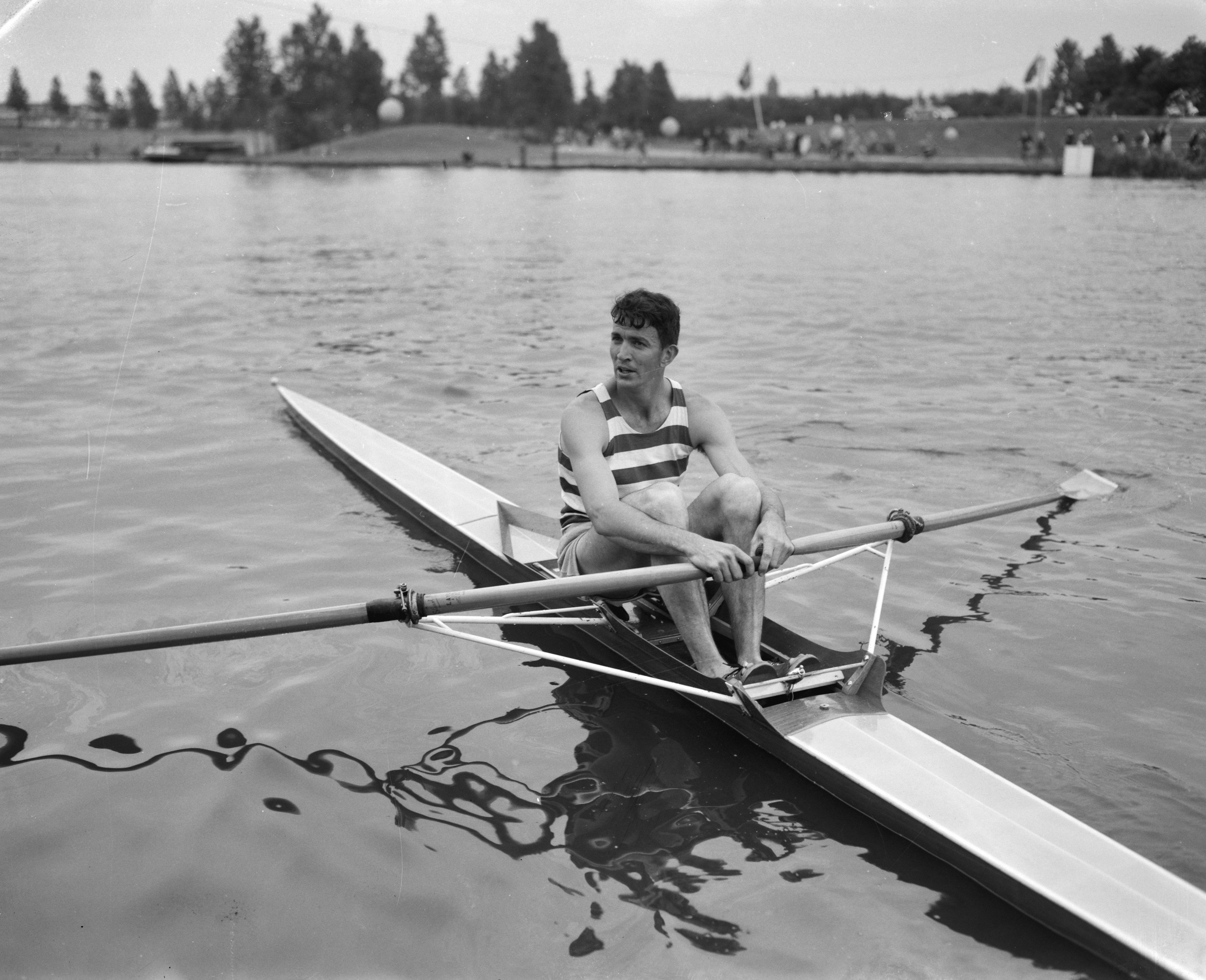 Collectie / Archief : Fotocollectie Anefo Reportage / Serie : [ onbekend ] Beschrijving : Hollandia bekerwedstrijden op de Bosbaan. Mackenzie Australie Datum : 19 juni 1961 Locatie : Amsterdam, Amsterdamse Bos, Bosbaan, Noord-Holland Trefwoorden : roeiers Persoonsnaam : HOLLANDIA Fotograaf : Bilsen, Joop van / Anefo Auteursrechthebbende : Nationaal Archief Materiaalsoort : Negatief (zwart/wit) Nummer archiefinventaris : bekijk toegang 2.24.01.04 Bestanddeelnummer : 912-6138